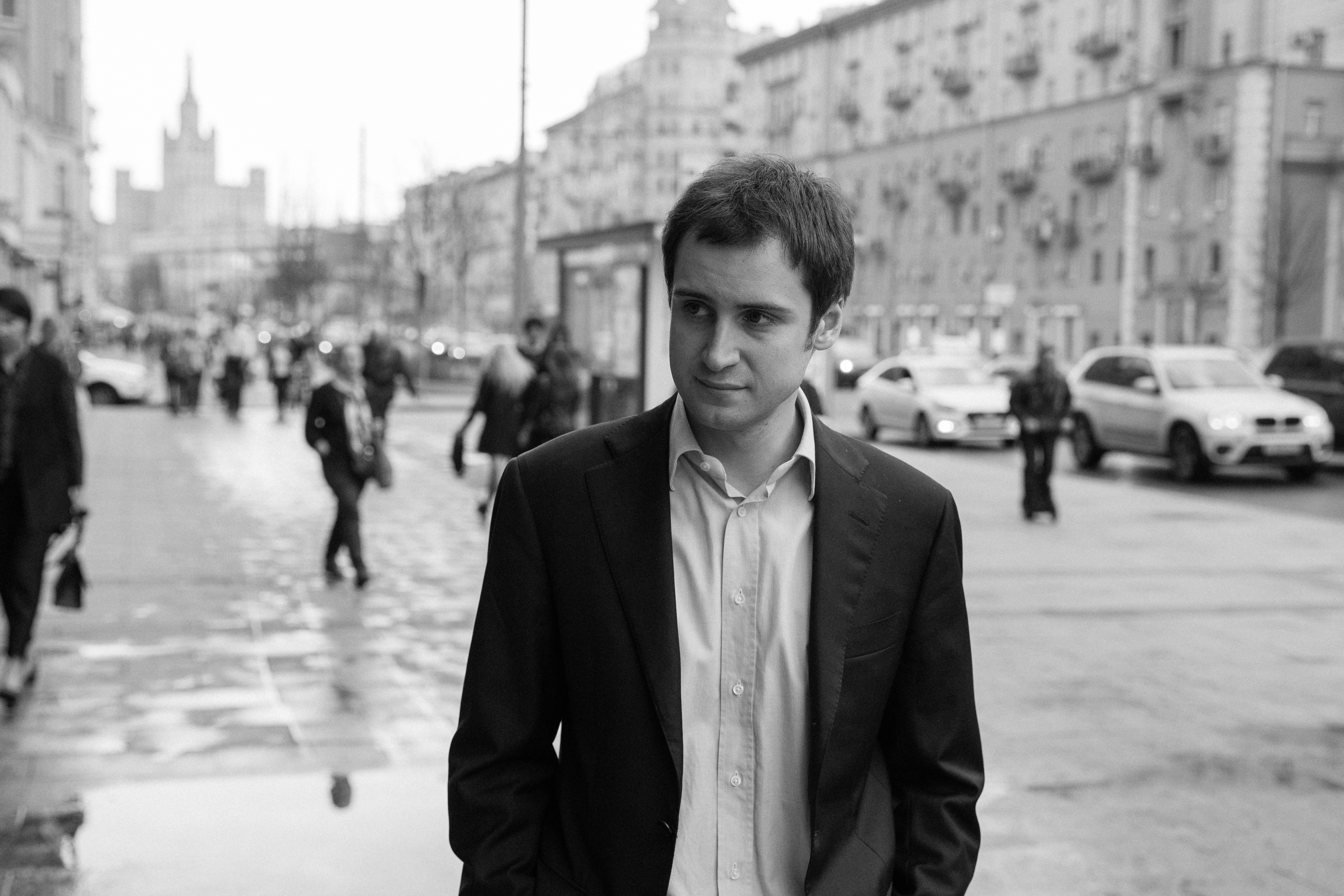 photo1